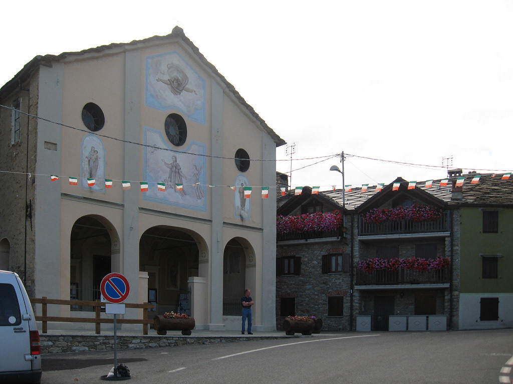 Parrocchia di San Bartolomeo a Frassinetto